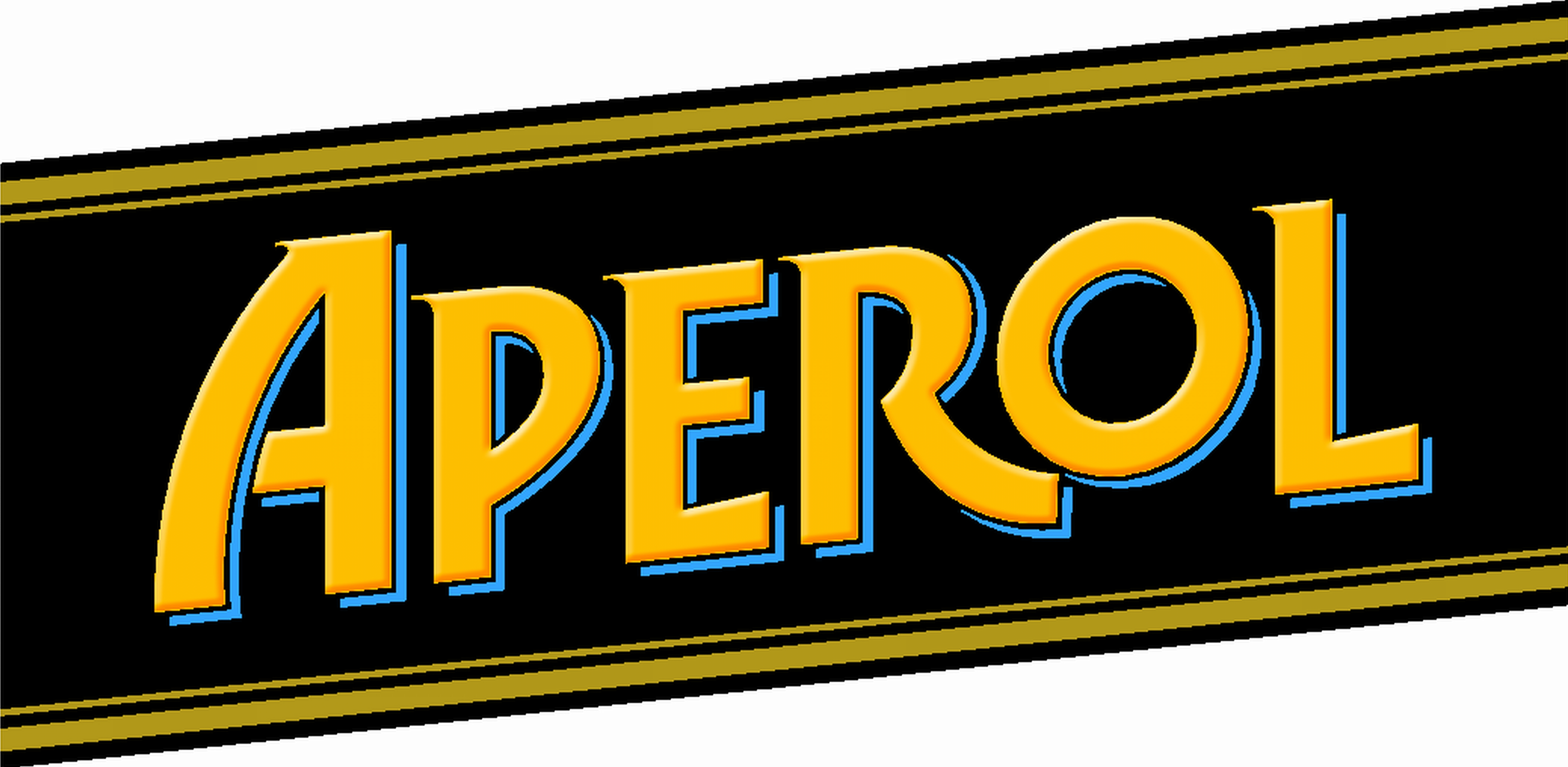 Logo dell'Aperol